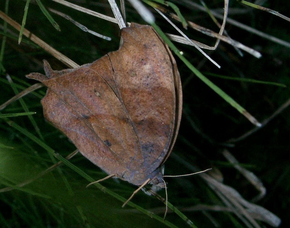 Melanitis phedima oitensis